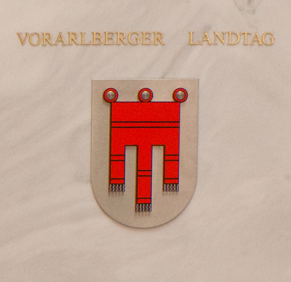 Sitzungssaal im Vorarlberger Landtag, Landhaus Bregenz